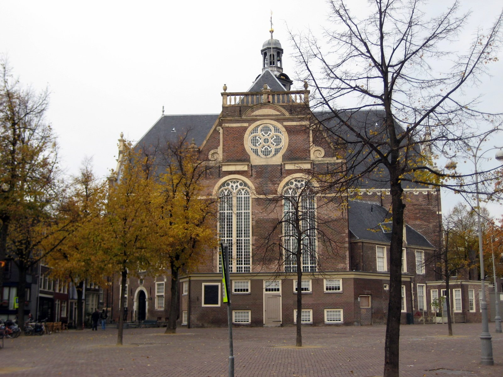 Amsterdam, Netherlands